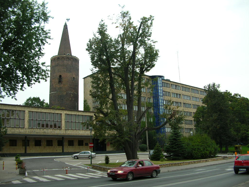 Opole - urząd wojewódzki i Wieża Piastowska